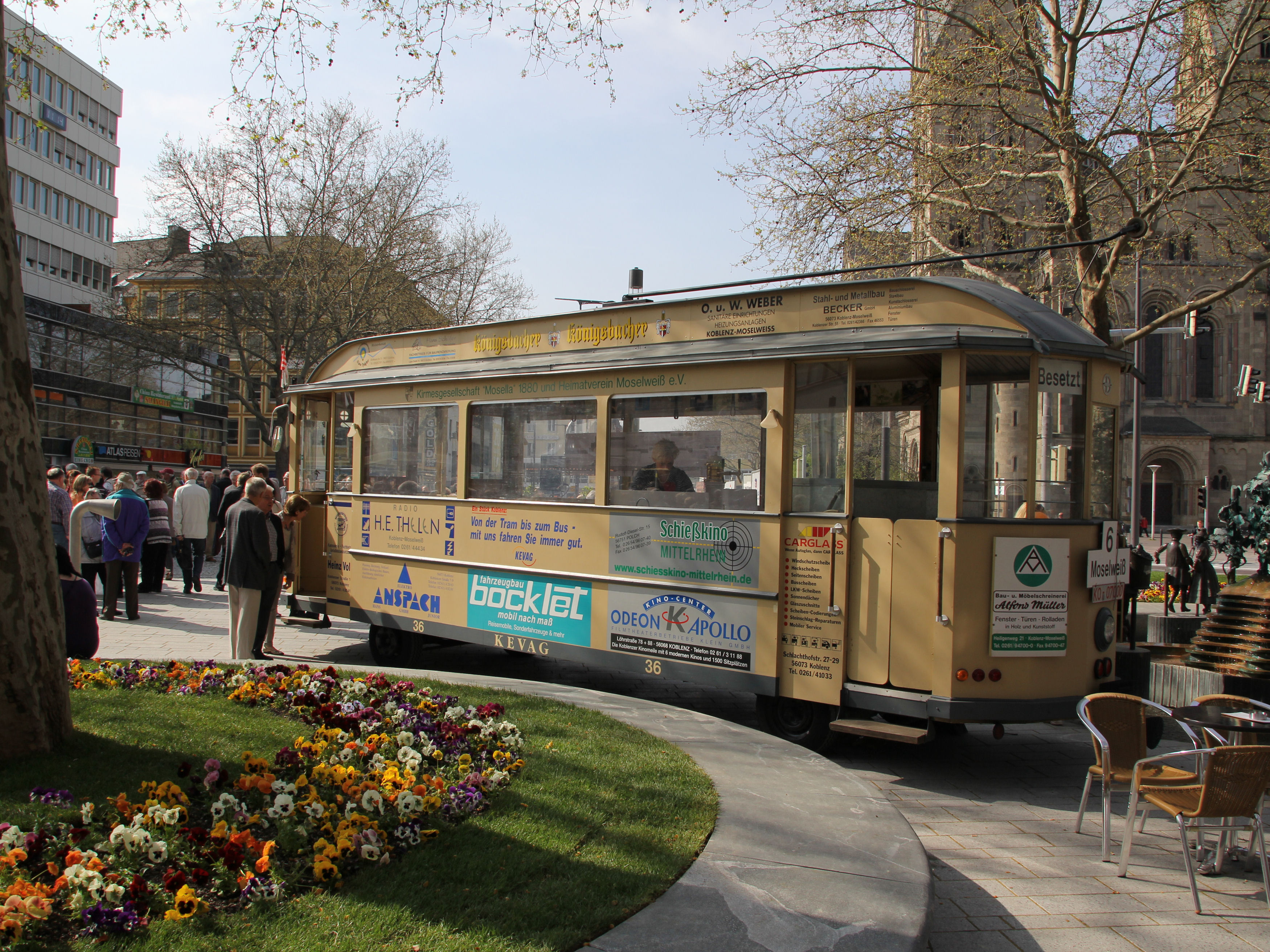 Koblenz im Buga-Jahr 2011 - Eröffnung der sanierten Löhrstraße - alte Koblenzer Straßenbahn